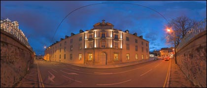 Façade secondaire de la bibliotheque francophone multimedia de Limoges